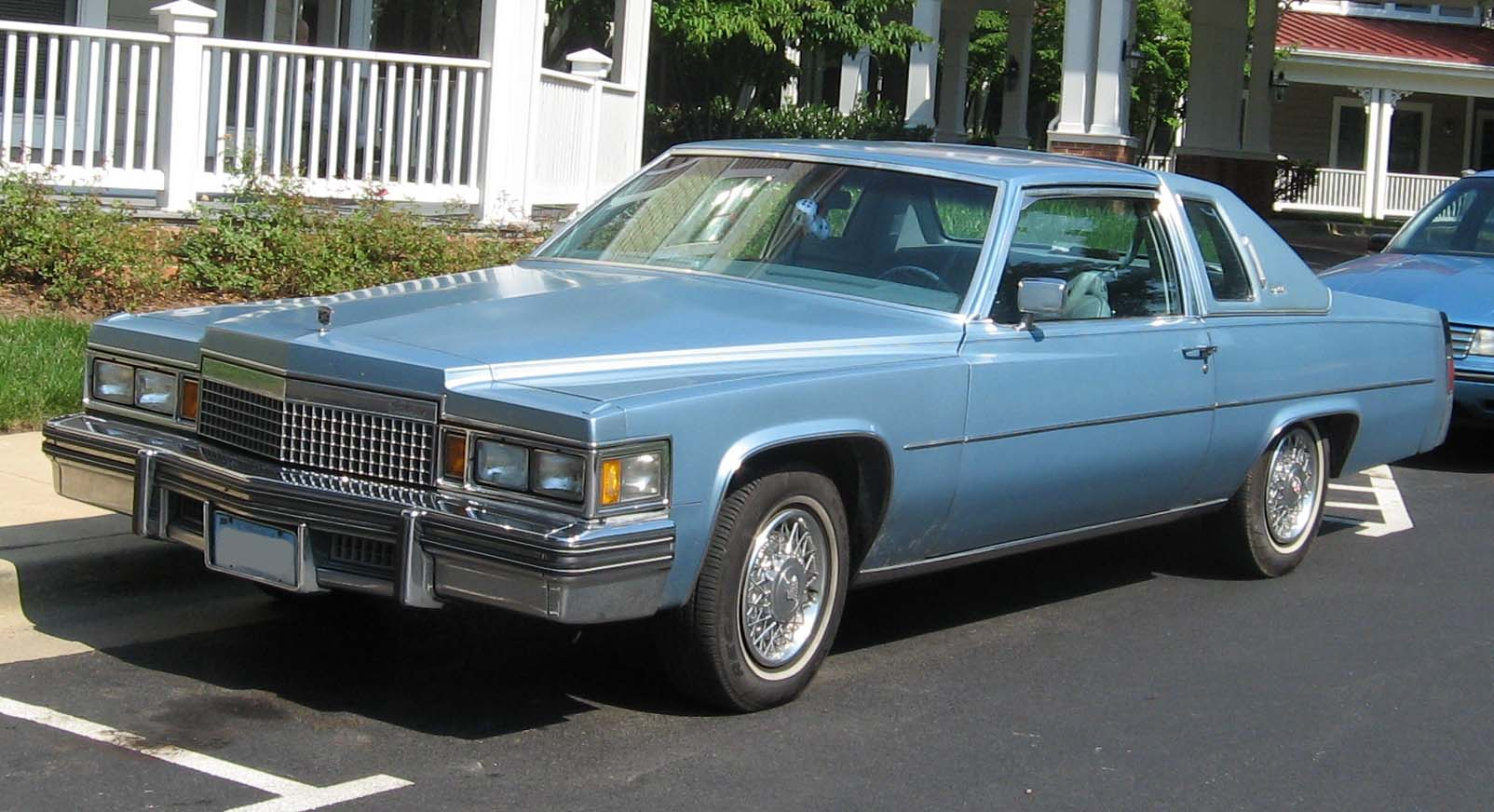 1977-1979 Cadillac Coupe de Ville photographed in USA.